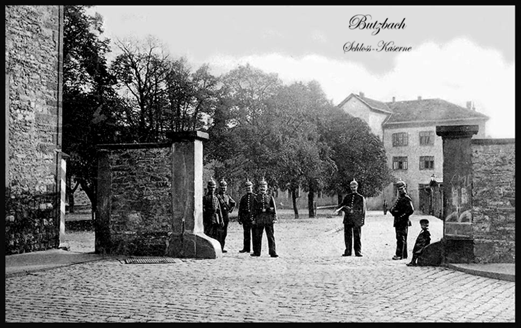 Kasernentor der Schloss-Kaserne in Butzbach mit Wache des I. Btl InfRgt 168